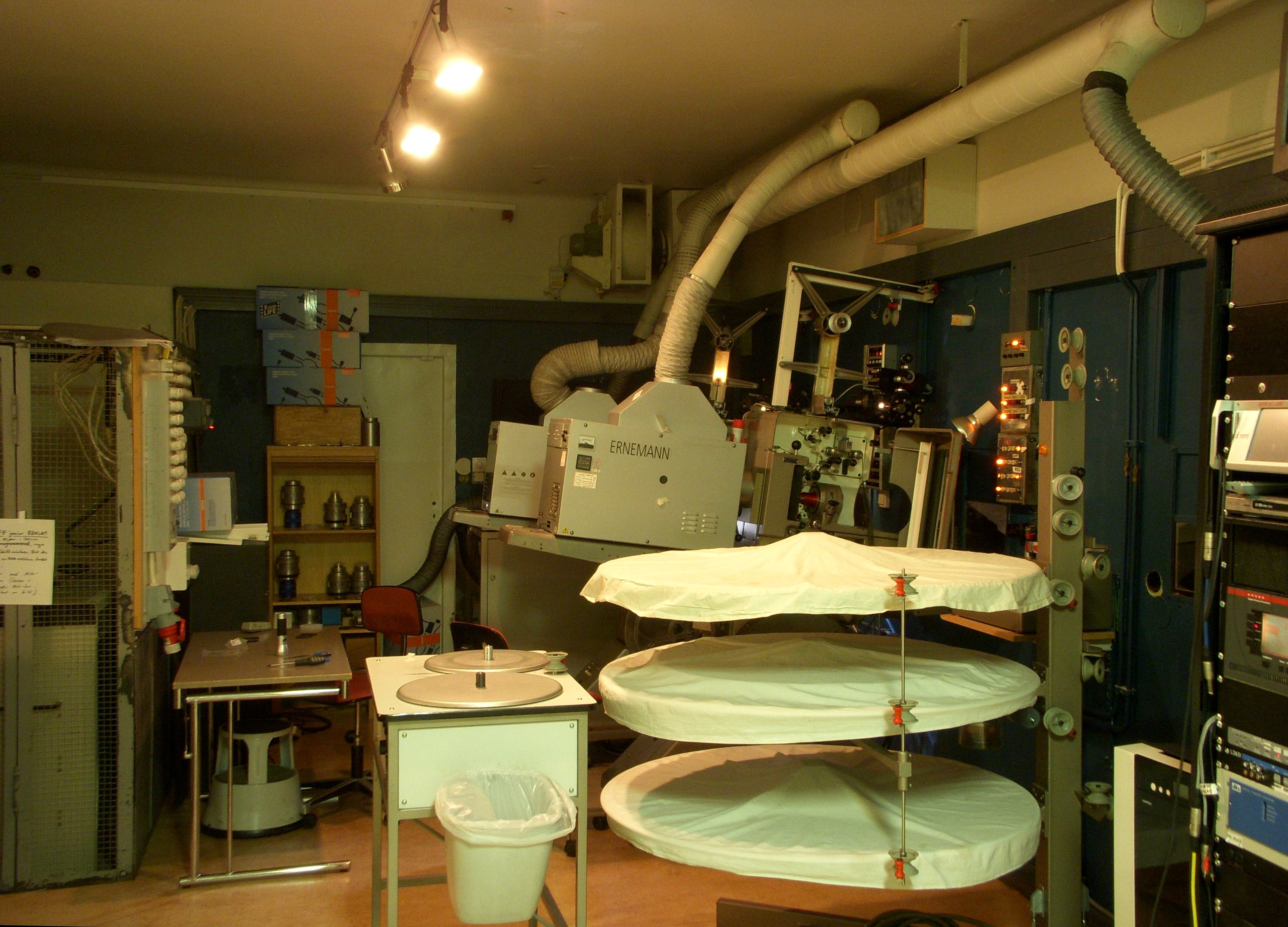 Skandiateaterns maskinrum